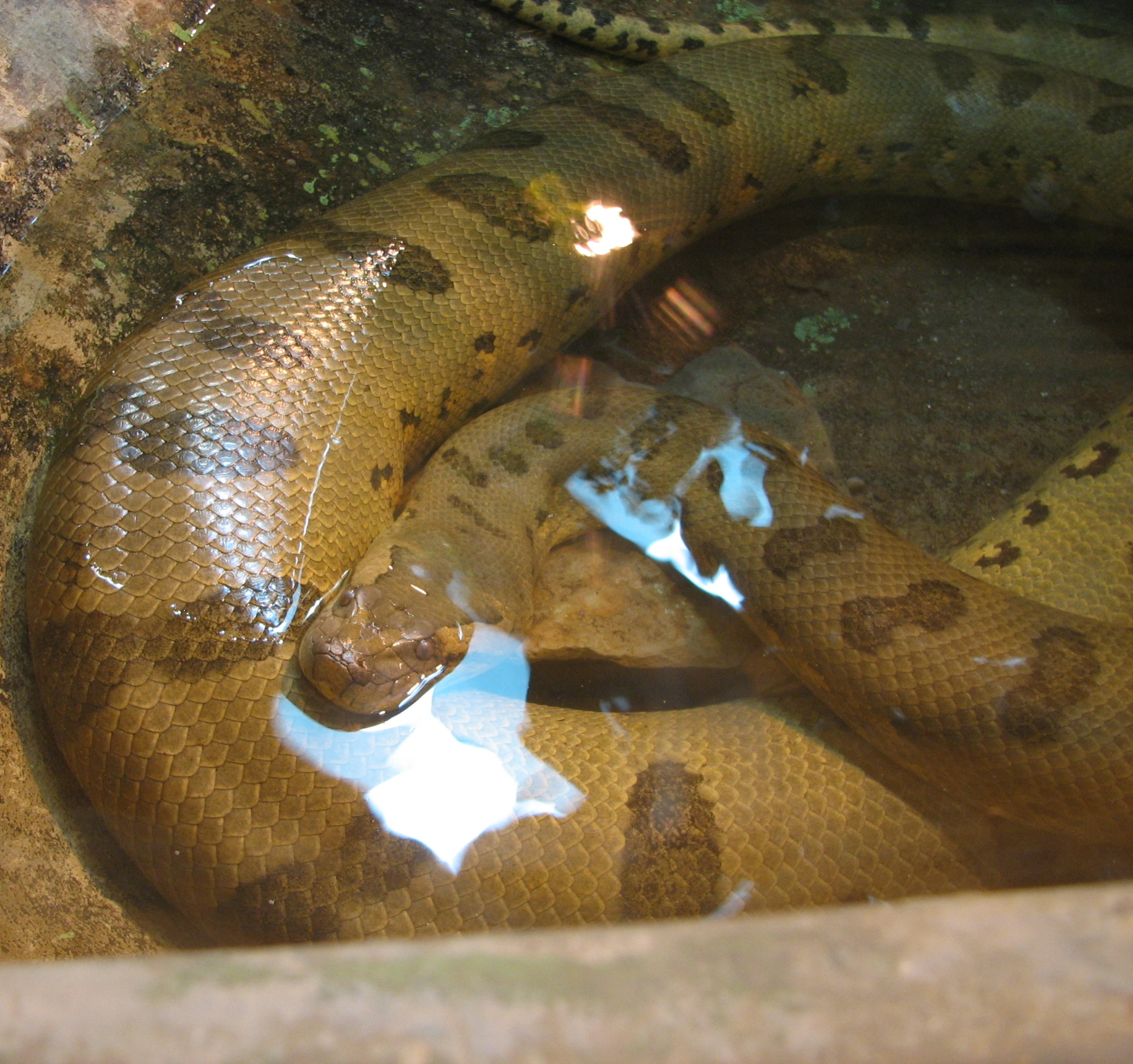 Green Anaconda - Eunectes murinus